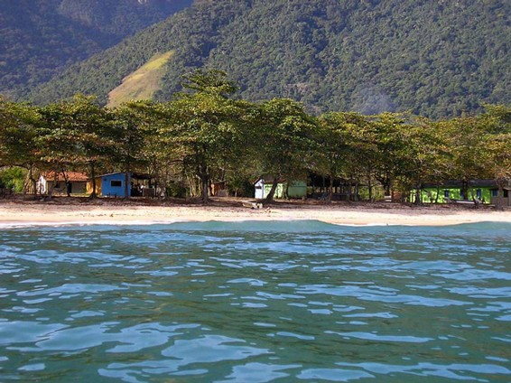 Paraty (RJ)- Comunidades caiçaras de Paraty, no sul fluminense, reclamam que condomínio de luxo na Praia do Sono restringiu o acesso ao mar Foto: Foto Reporter Isabela Vieira/Abr